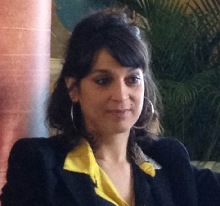 Donatella Finocchiaro agli Incontri Internazionali del Cinema di Sorrento 2018